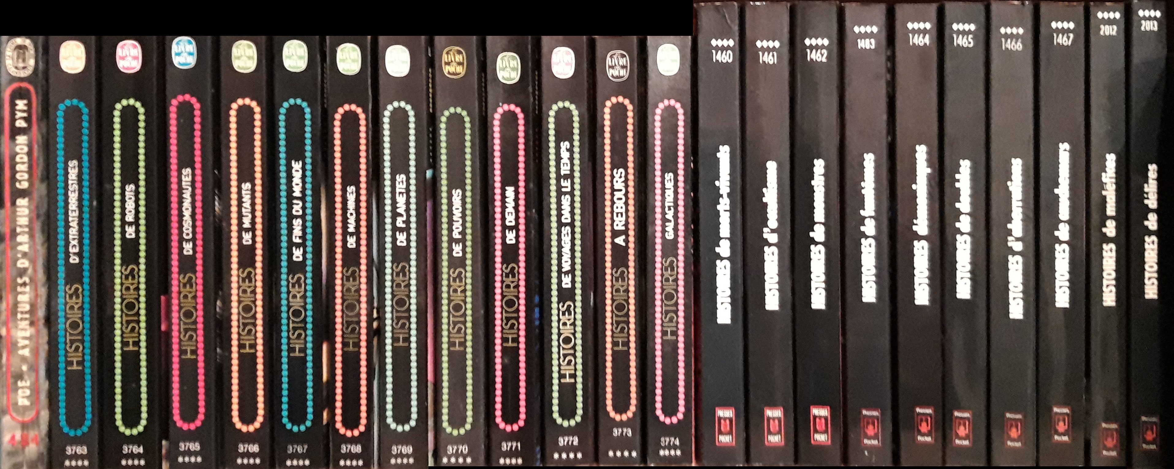 Anthologies françaises Pockets SF et Fantastique, années 80'.